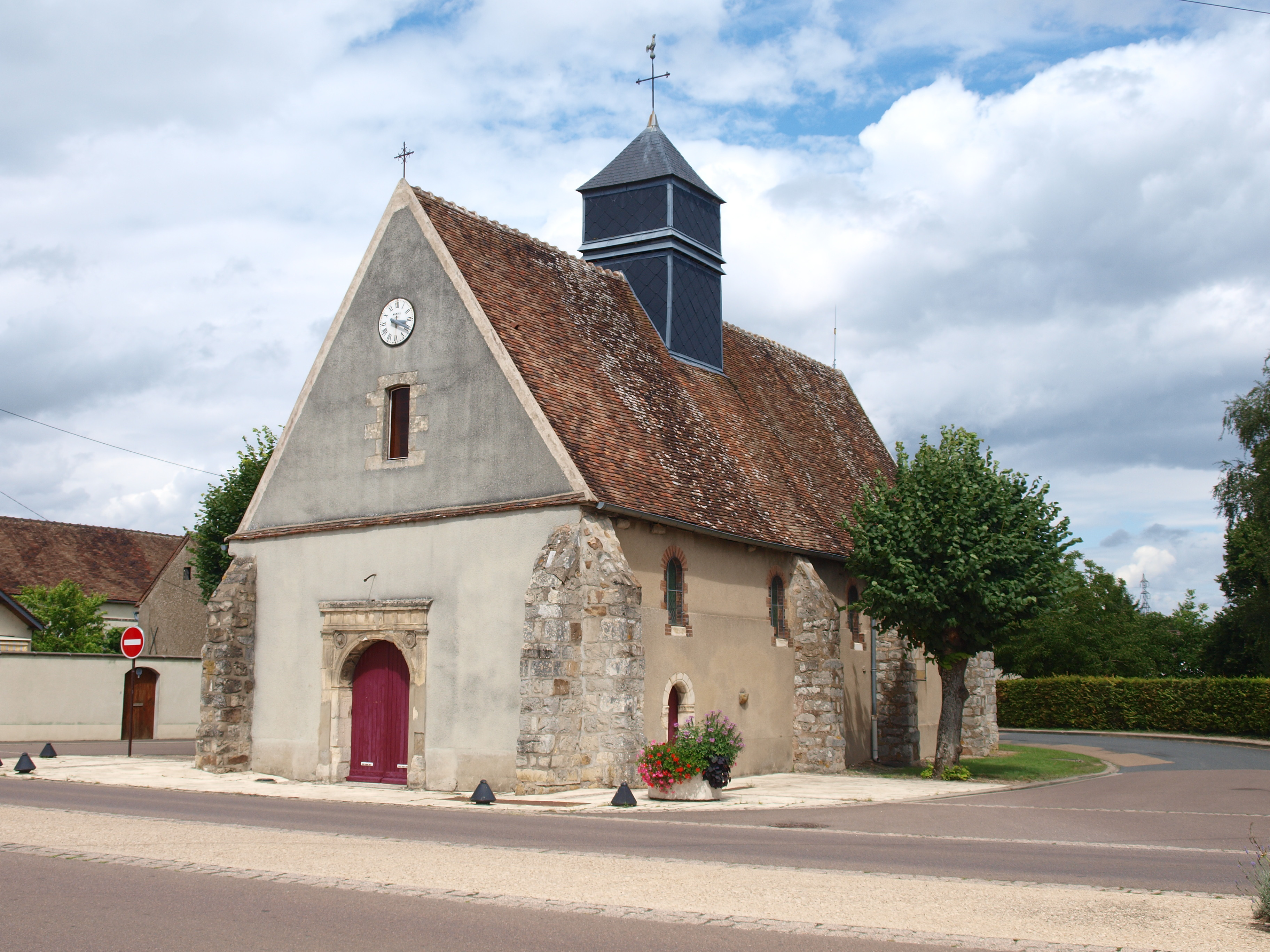 Église paroissiale de Saint-Denis-lès-Sens (Yonne, France)